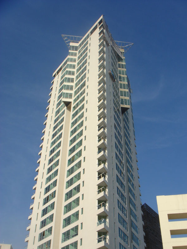 Torre Titanium. Edificio Residencial. Condominio Vertical de Lujo. Zapopan, Jalisco, México